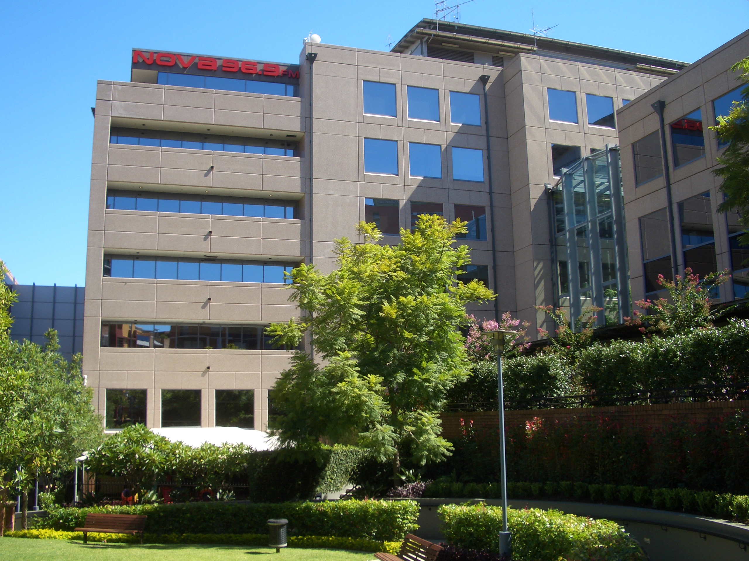 Nova 96.9 Radio Station Studios, Pyrmont